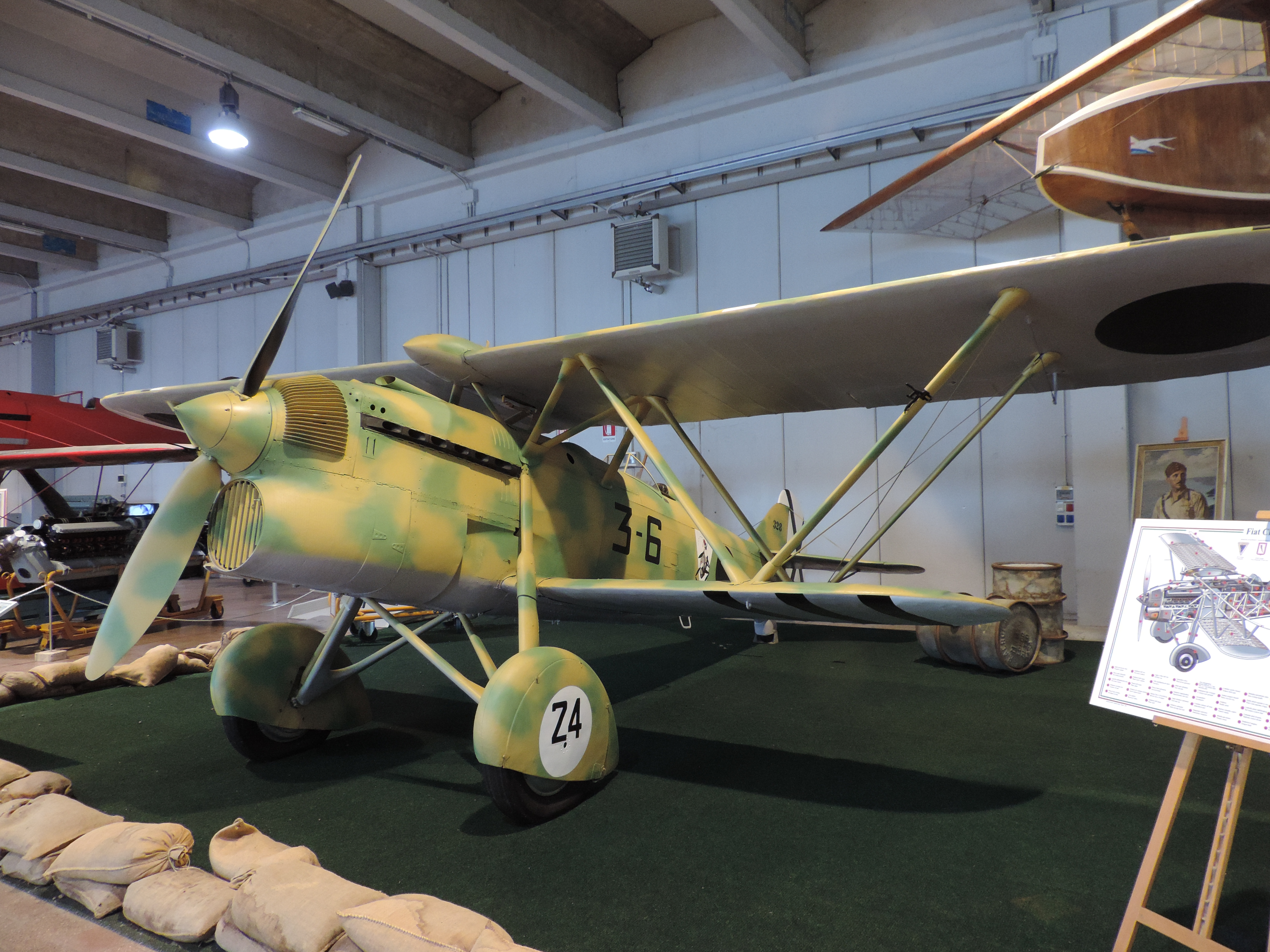 Fiat CR.32 im Luftwaffenmuseum Vigna di Valle